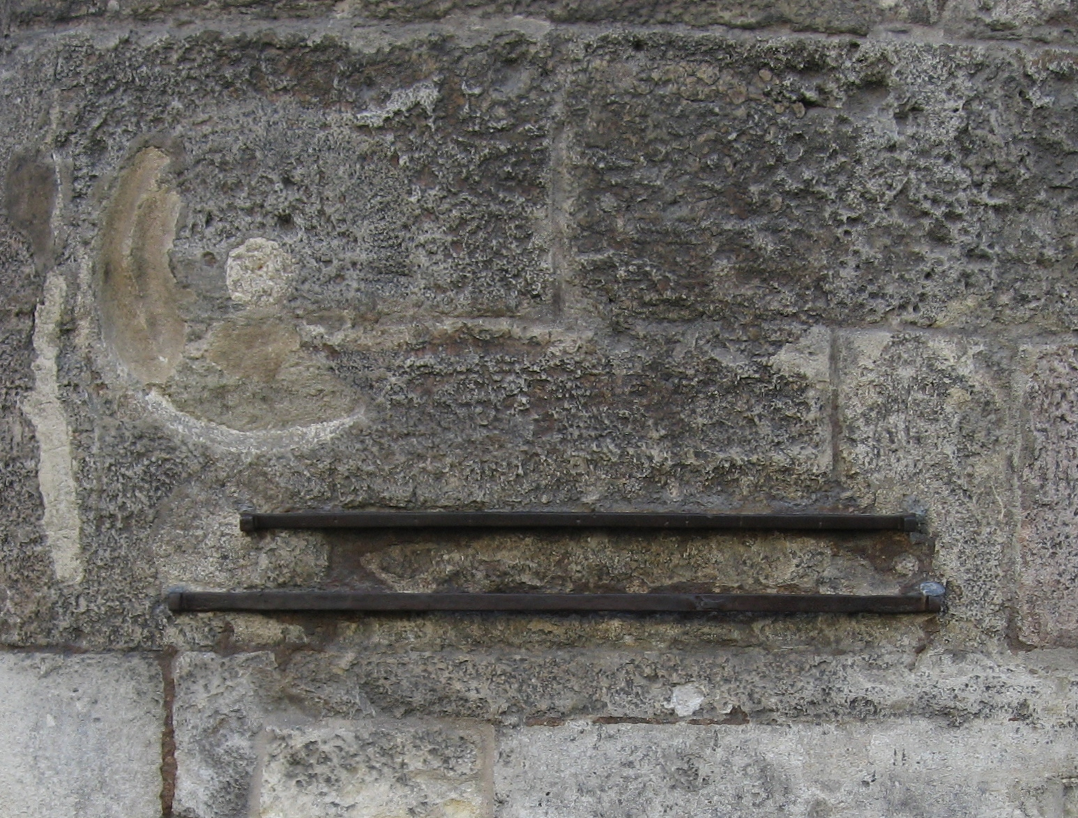 Wien Stephansdom Maßeinheiten